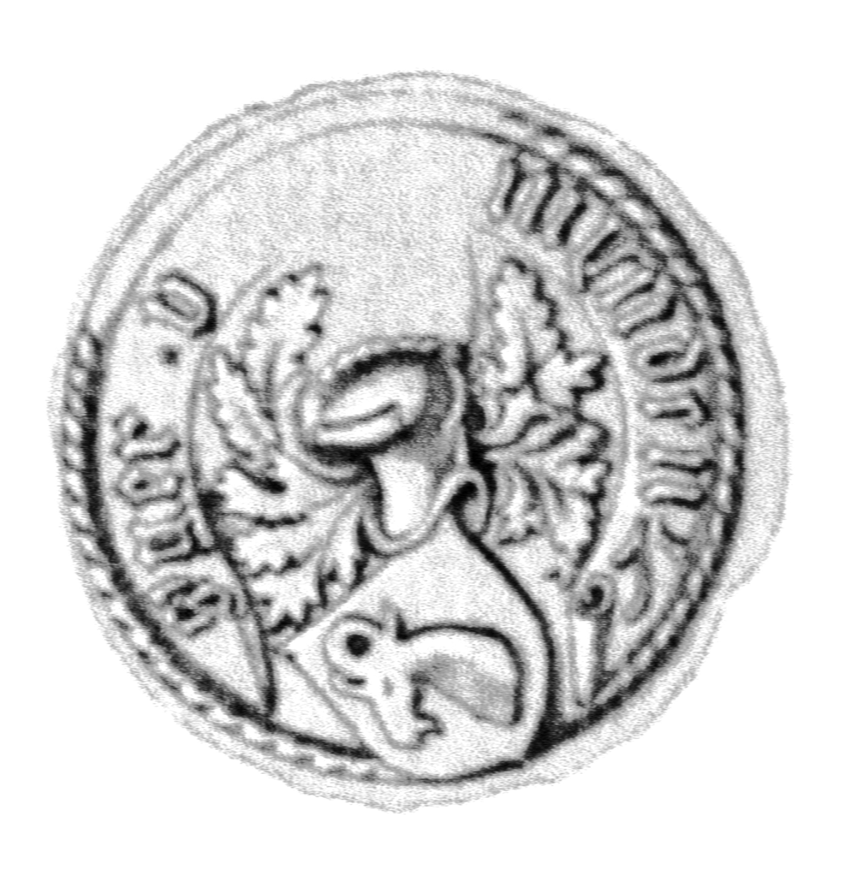 Siegel des Ratsmannes Gerd von Mi(y)den. Das Siegel stammt aus der Zeit um 1458. Siehe Emil Ferdinand Fehling: Lübeckische Ratslinie, Nr. 519 (Gerhard von Minden, BM).